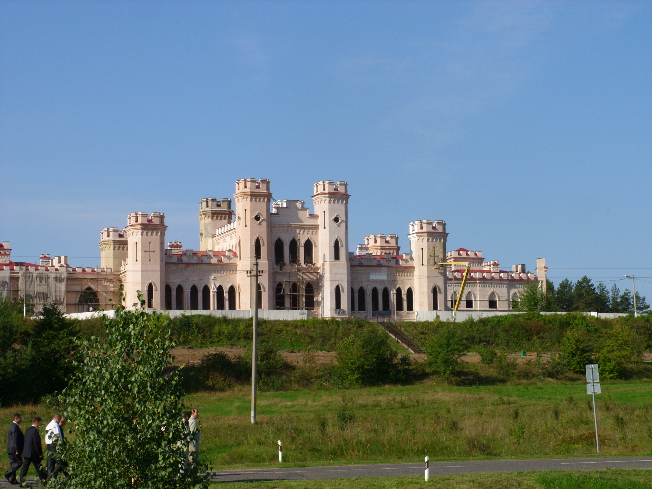 Беларуская (тарашкевіца): Косаўскі палацава-паркавы ансамбль: рэшткі былога палацу Пуслоўскіхмэмарыяльны музэй-сядзіба Т. Касьцюшкіфрагмэнты парку. г. Косава This is a photo of Belarusian heritage monument. Reference number: 111Г000305 ( WLM)